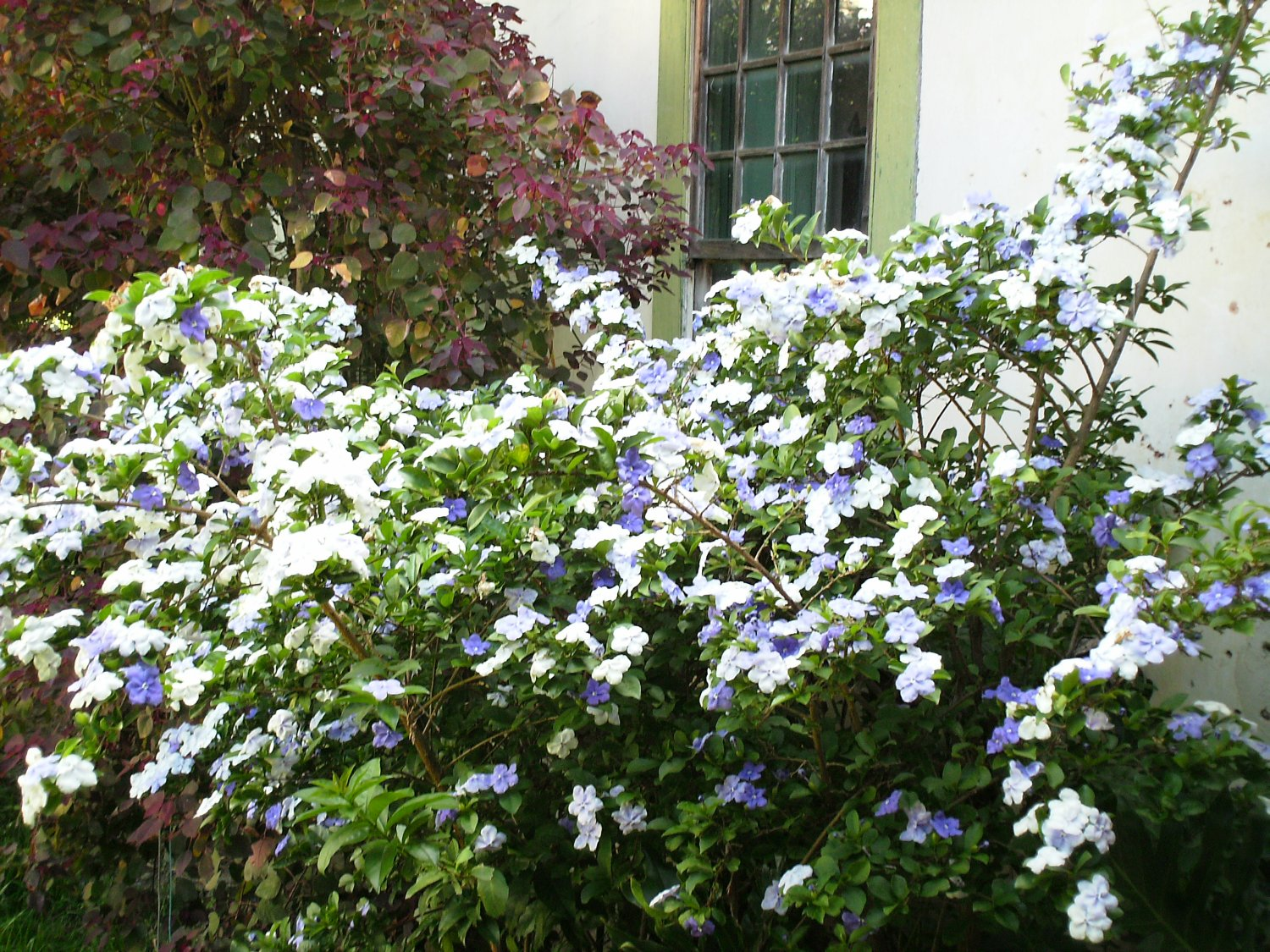 Brunfelsia uniflora (Manacá).